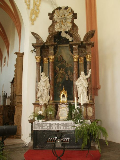 Altar der Heiligen Elisabeth von Schönau (mit dem Reliquiar in dem Schädeldecke Elisabeths aufbewahrt wird) in der Klosterkirche Sankt Florin, Kloster Schönau im Taunus